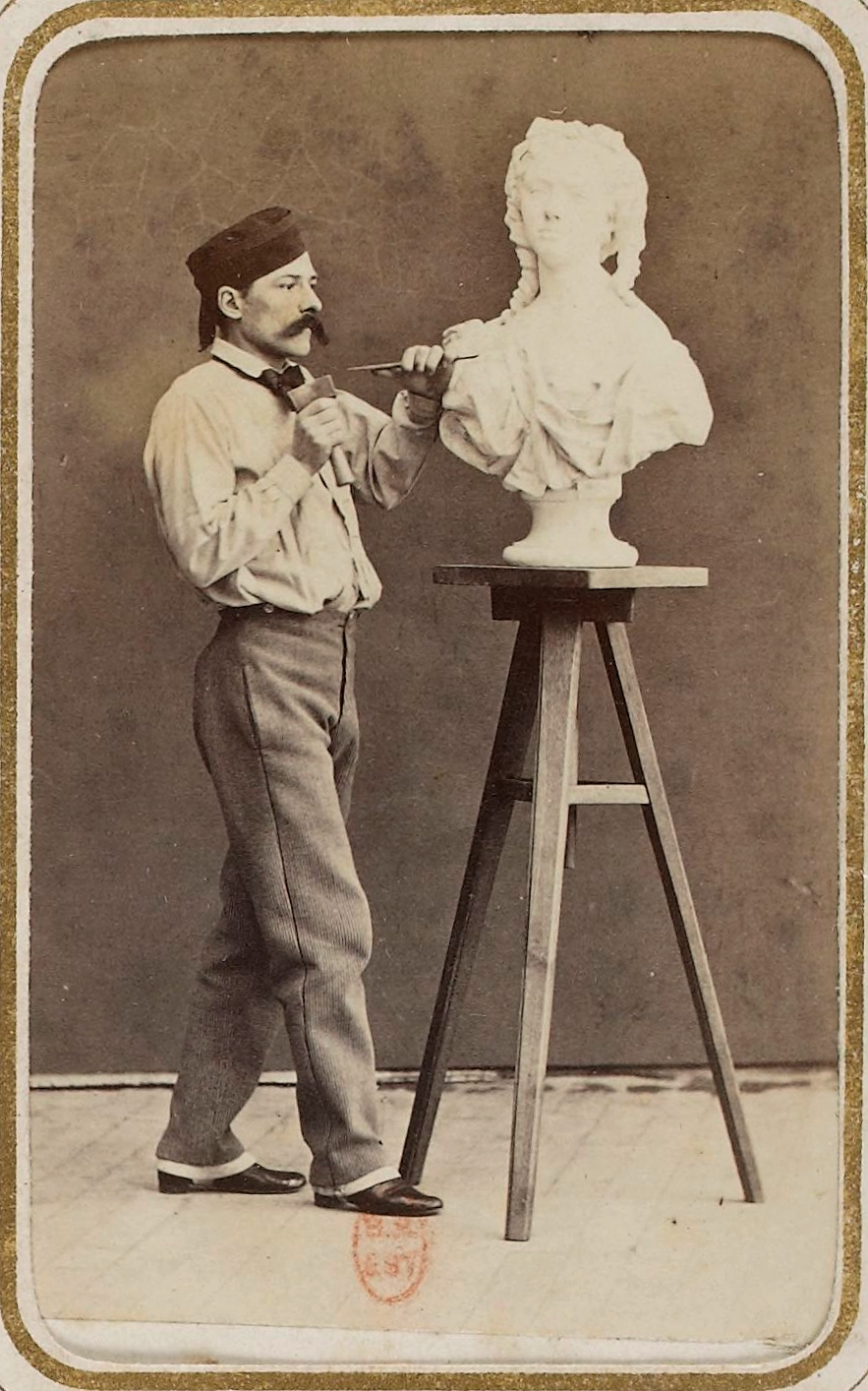 Portrait carte de visite d’Eugène Cyrille Brunet, Louis-Jean Delton (1807-1891) ou Jean Delton (fils 1850-1901), photographes à Paris. Album de portraits cartes de visite ayant appartenu à Édouard Manet - BNF - Numérisation Gallica.